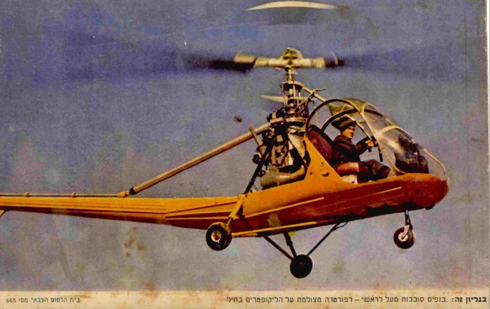 הילר 360 בשירות חיל האוויר הישראלי